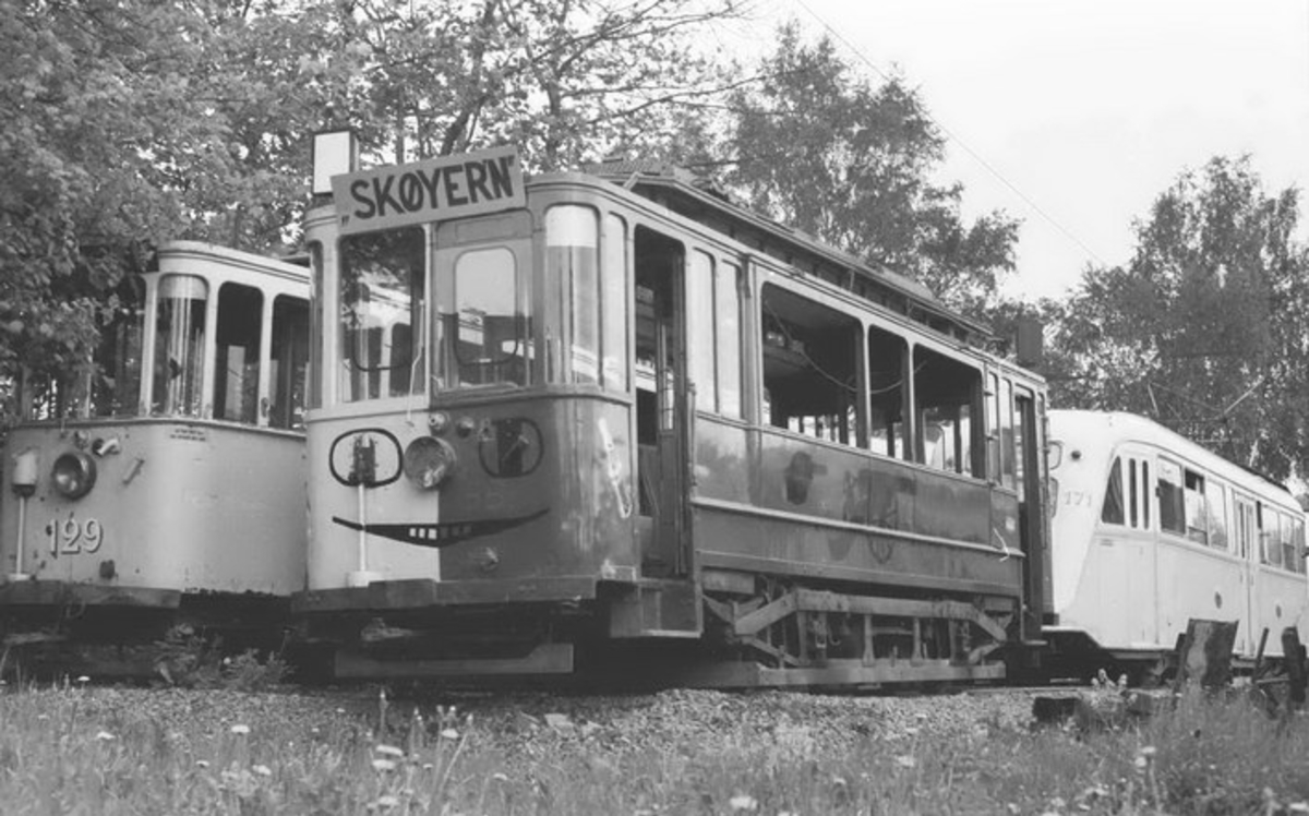 SS-trikk utrangert på 1960-tallet. Brukt som UKA-trikk i 1964, ikke senere brukt. Avstilt ved vognhallen på Vålerenga. 1966.